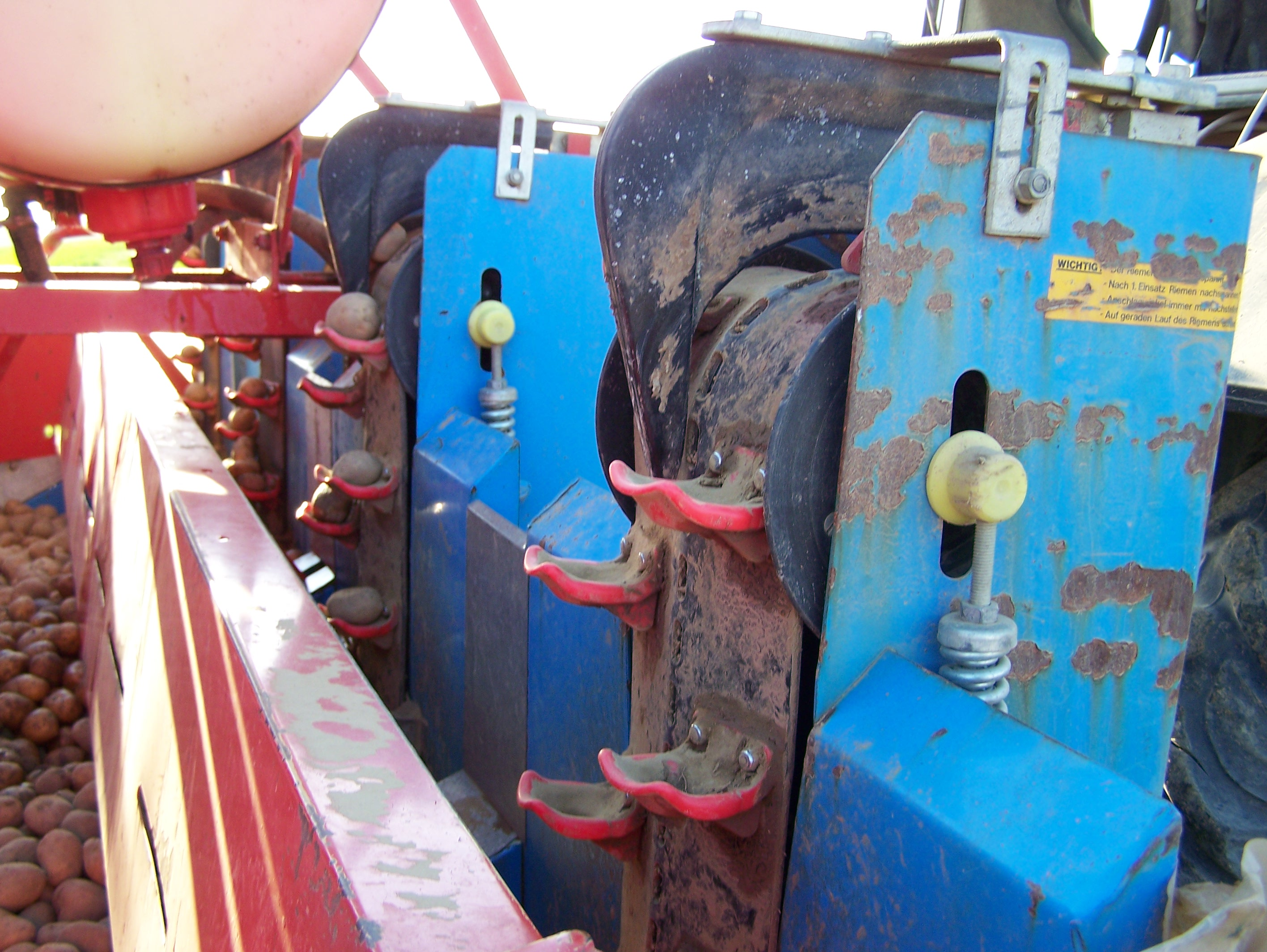 Bechergurt (Schöpfbecherkette) einer Kartoffellegemaschine